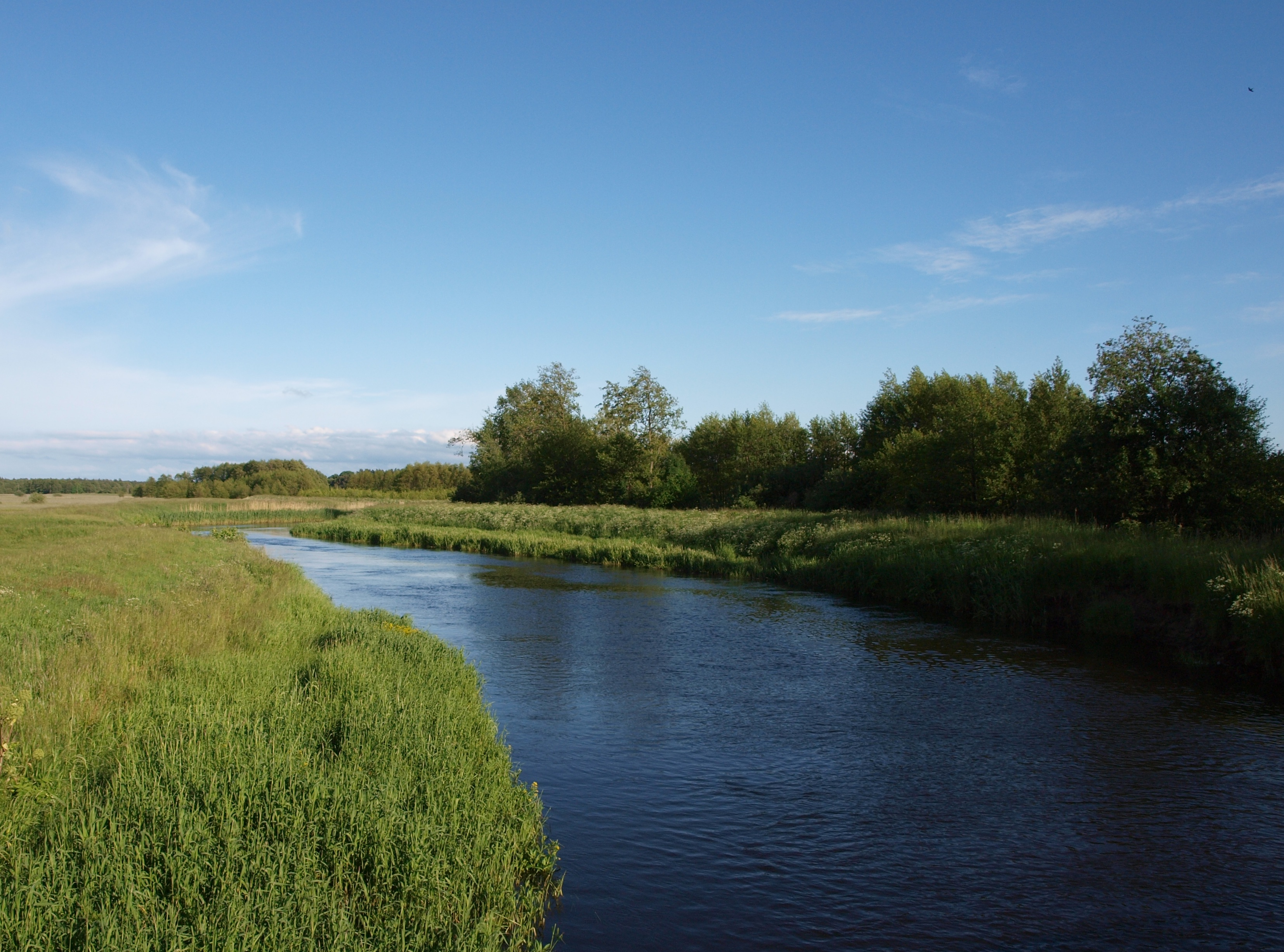 Łeba na wysokości wsi Gać.